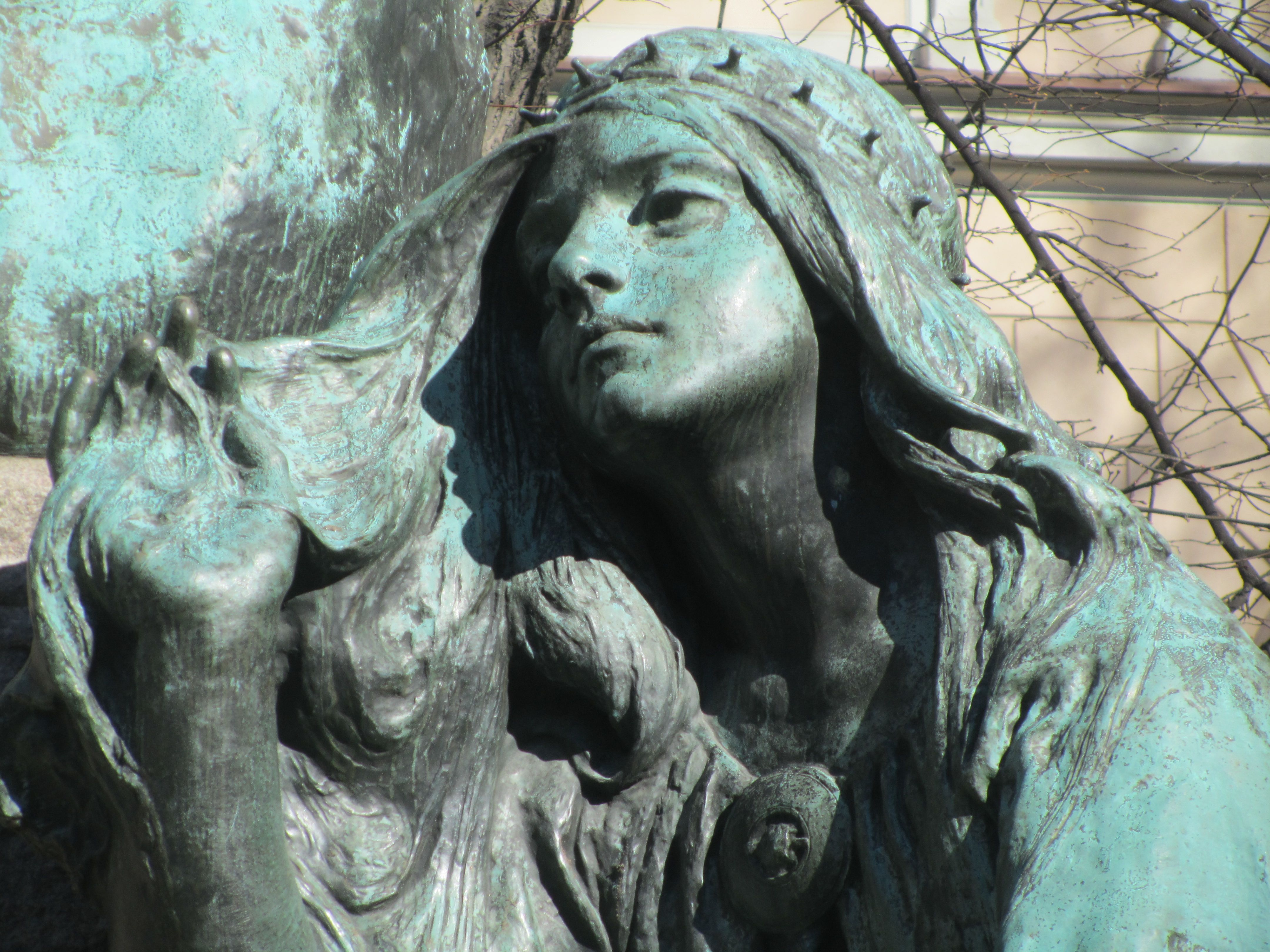 Elias Lönnrot (1902) - Emil Wikström. Sijainti: Lönnrotin puistikko, Lönnrotinkatu 5, Kamppi